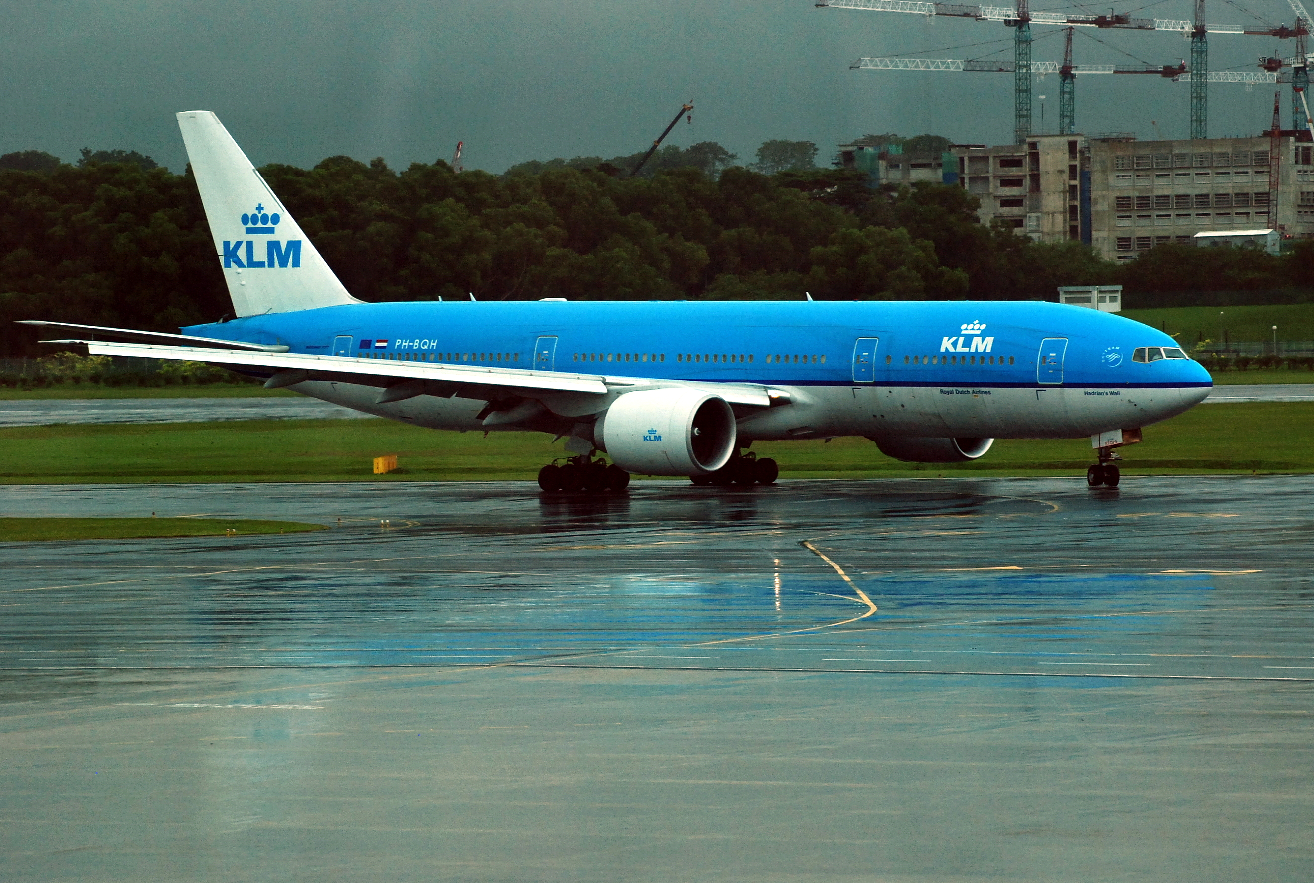 KLM Boeing 777-200ER (PH-BQH) taxiing at Singapore Changi Airport.